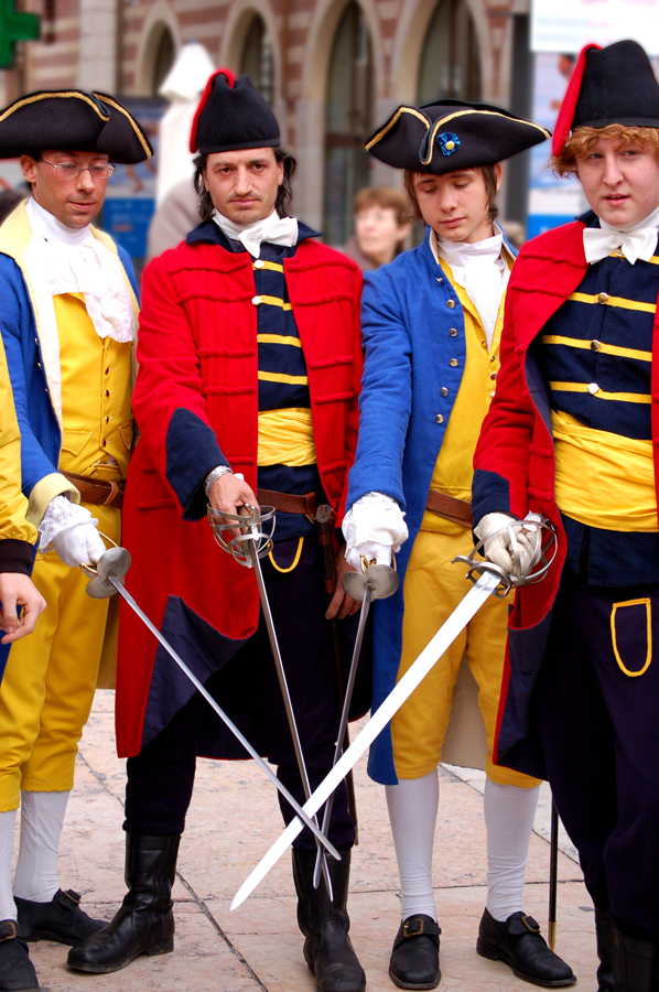 Milizie venete a Verona (in rosso gli Schiavoni e in oro-azzurro la Guardia Nobile Veronese)